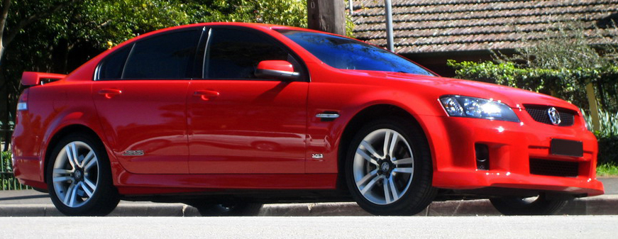 2006-2007 Holden VE Commodore SS sedan.